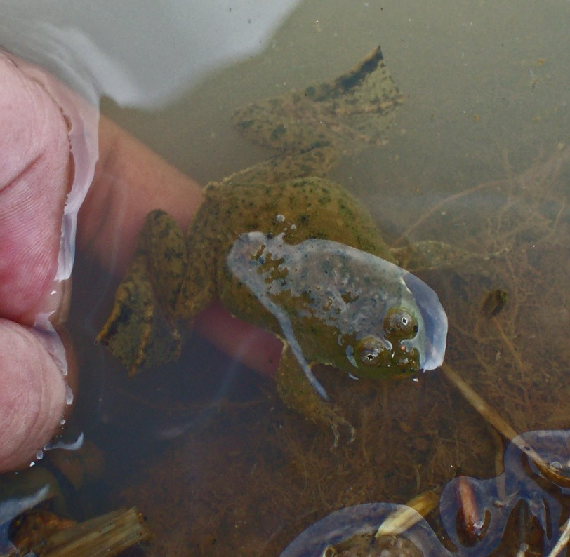 Occidozyga lima, female, Darmaga, Bogor, West Java, Indonesia